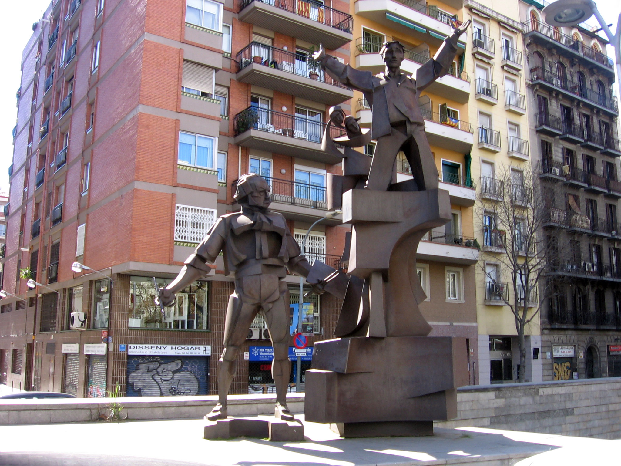 A Goya (José Gonzalvo).